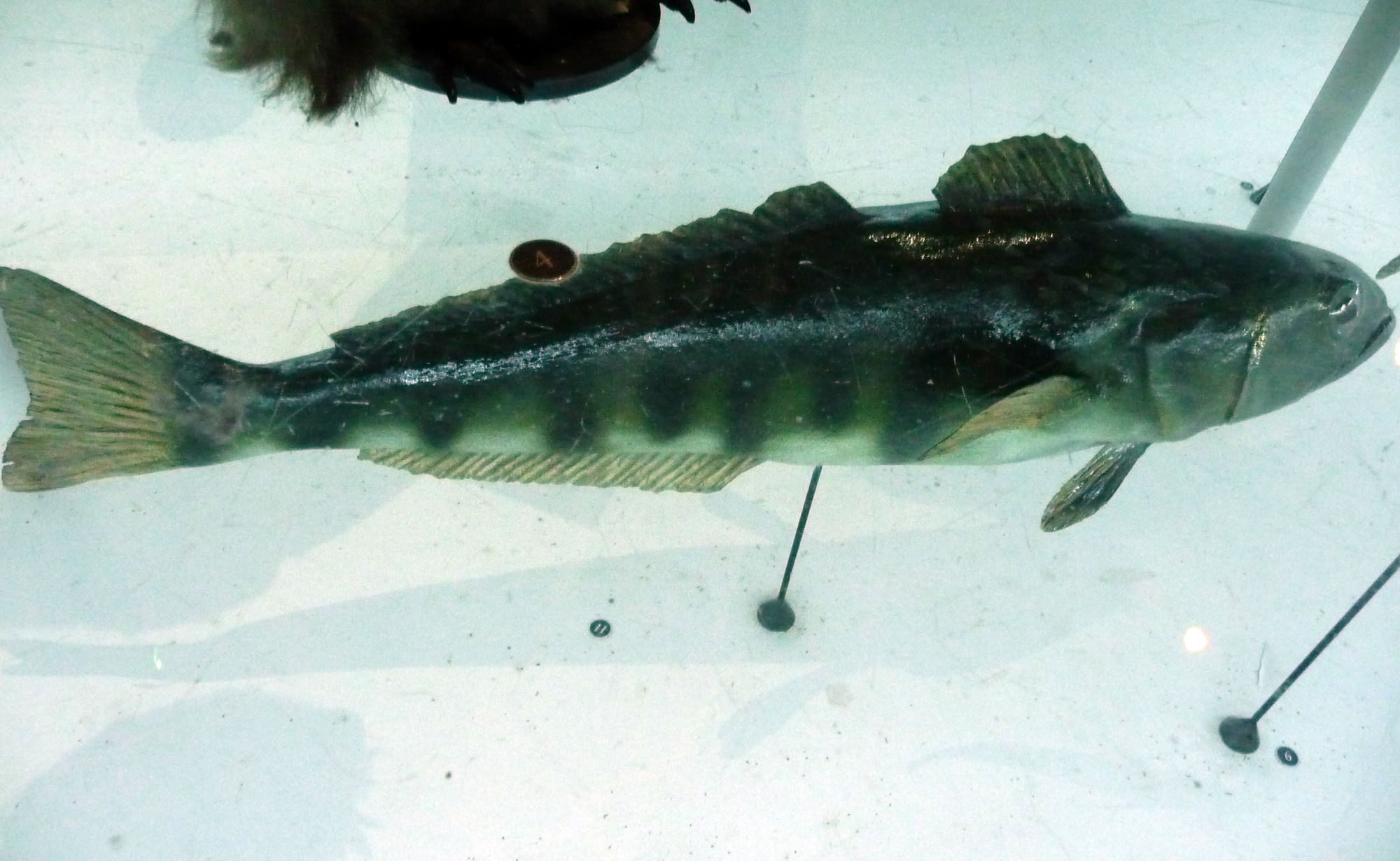 légine antarctique moulage (Dissostichus mawsoni)